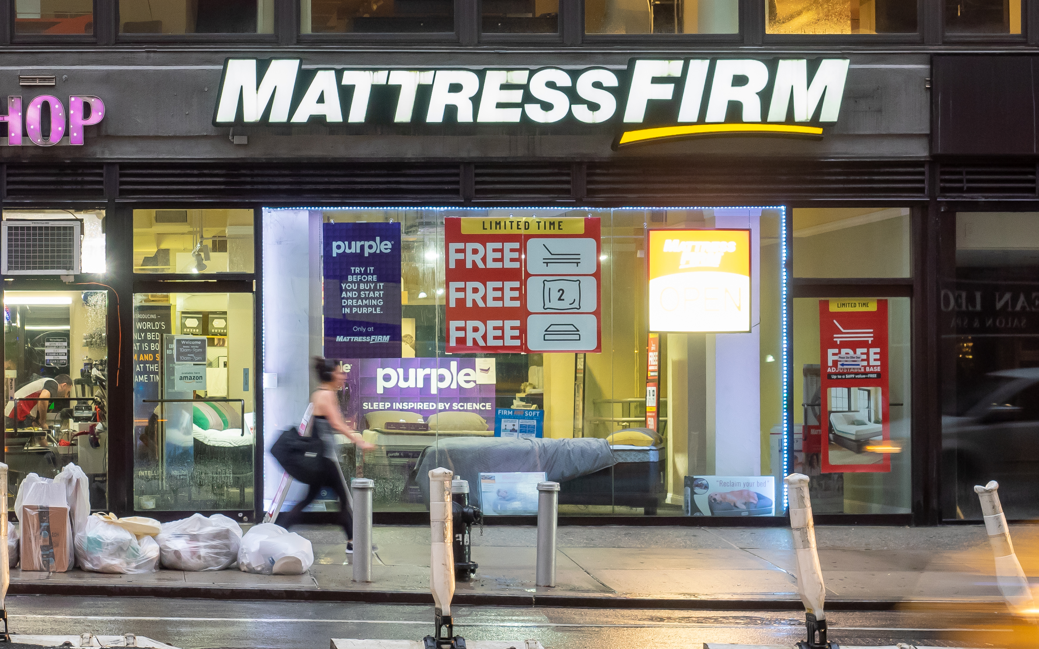 Upper East Side, NYC